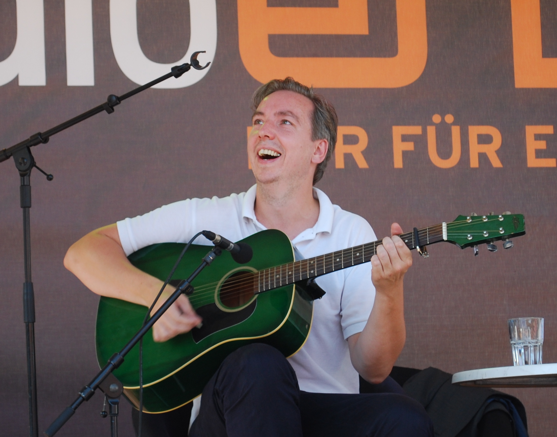 Olli Schulz: 15 Jahre RadioEins